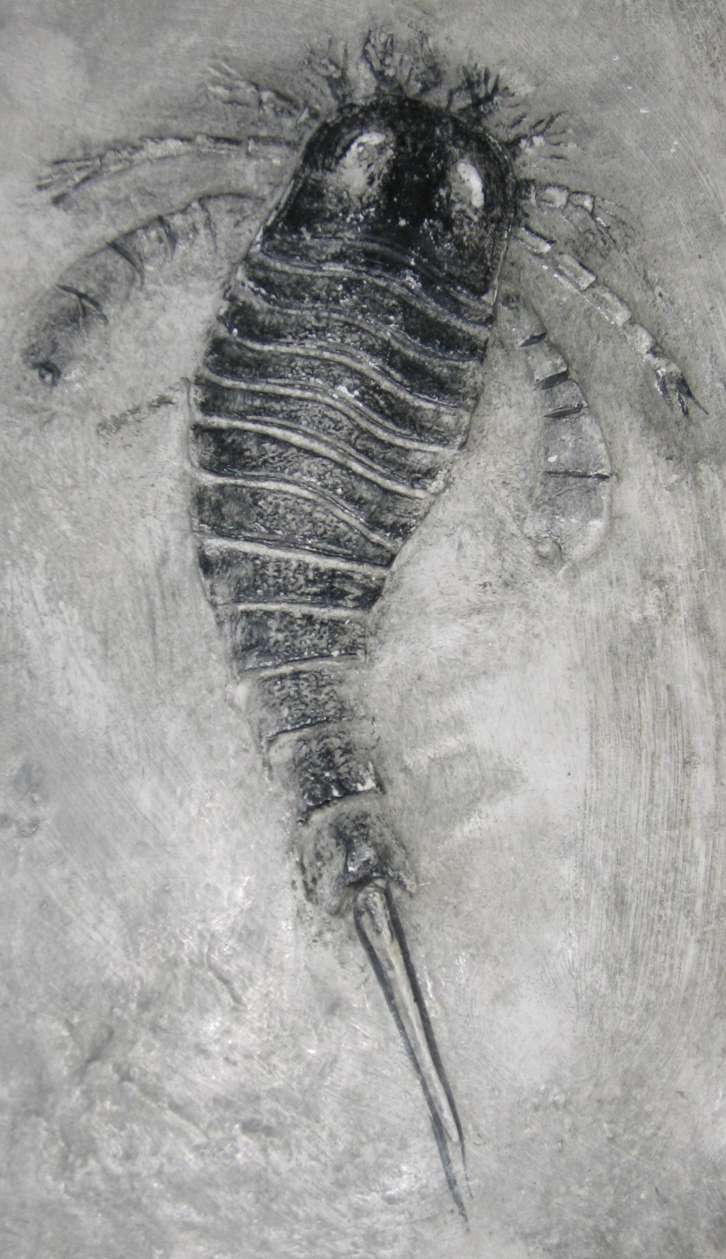 photo représentant un euryptéride (Arthropode) et ses appendices locomoteurs. Catégorie:Arthropode